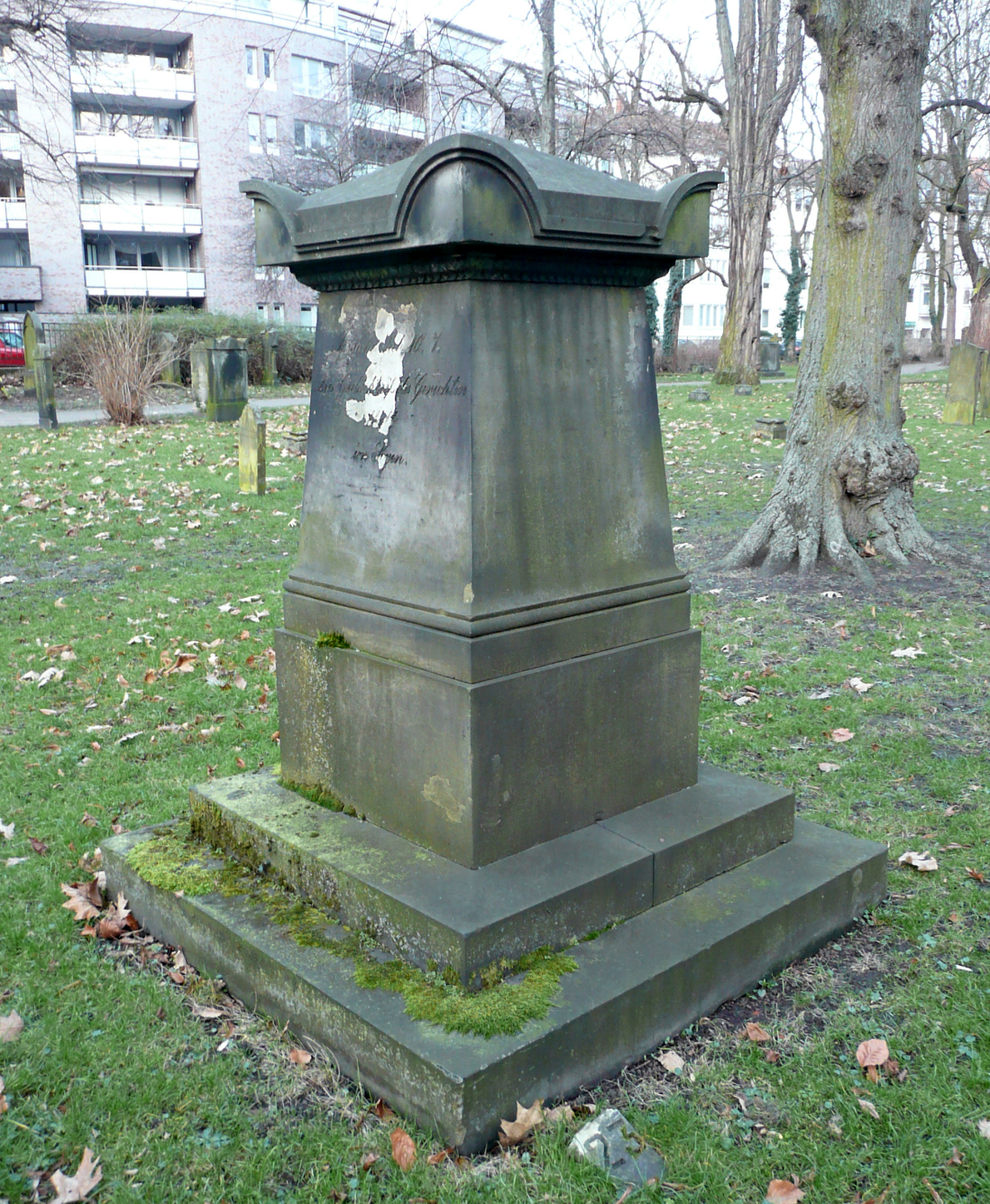 Grab von Friedrich Wilhelm von Dachenhausen auf dem Gartenfriedhof